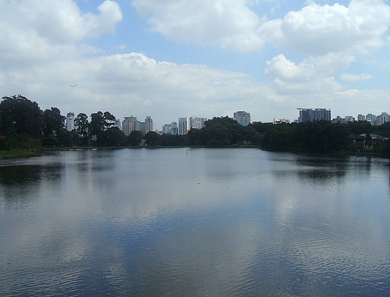 Lago das Garças, Parque do Ibirapuera, São Paulo, Brasil.